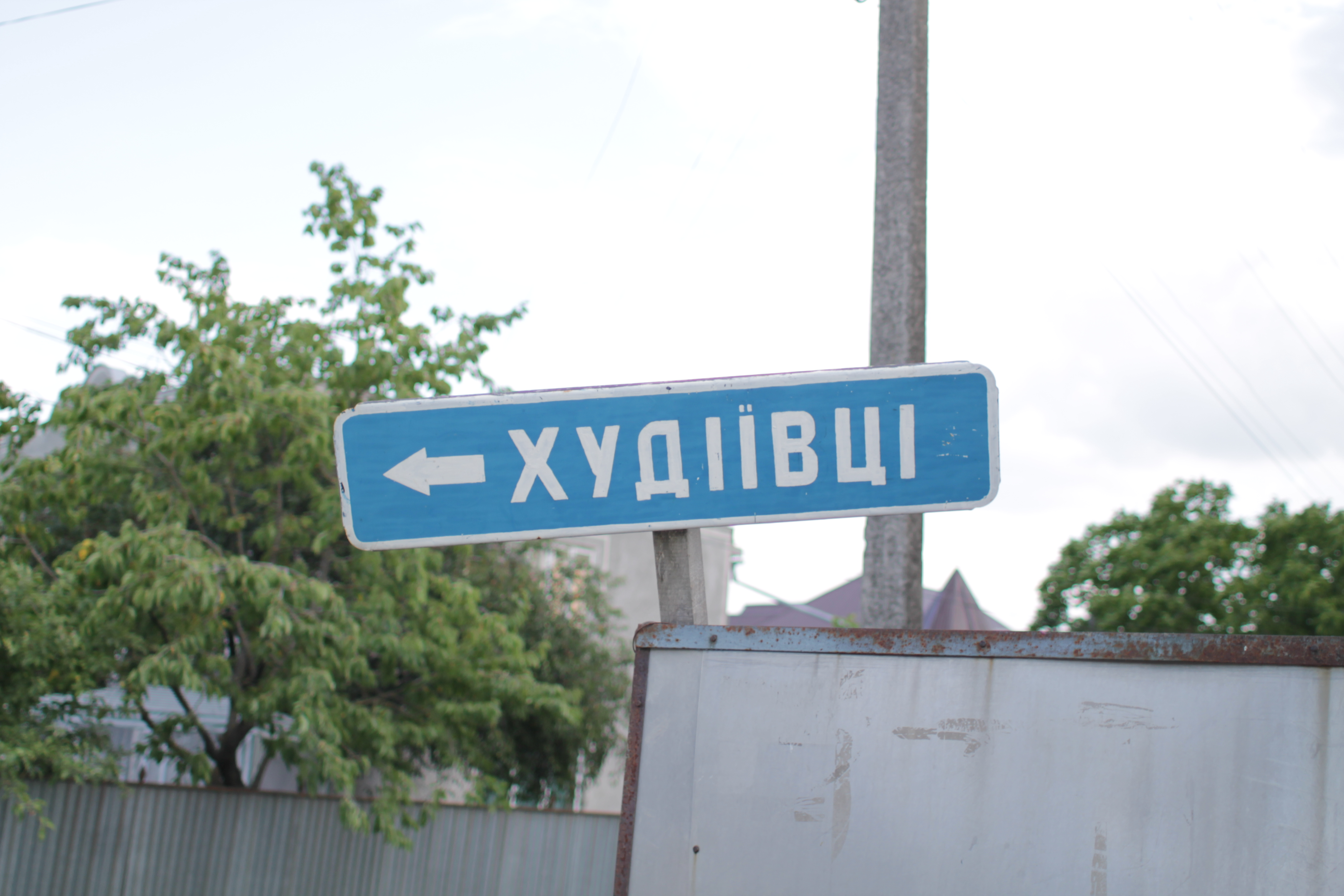 Худівці, табличка